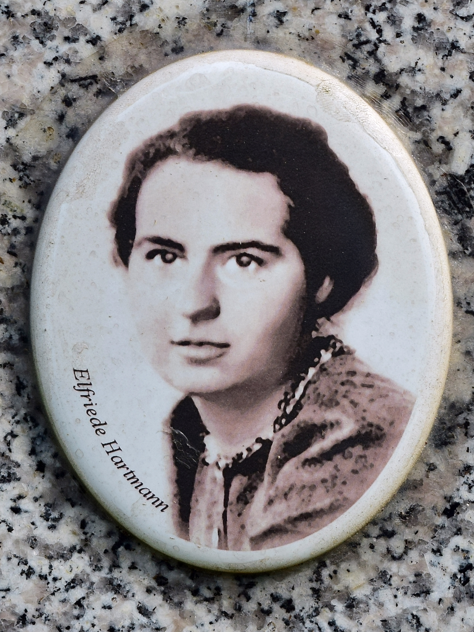 Bestattungs- und Gedenkstätte für die Opfer der NS-Justiz auf dem Wiener Zentralfriedhof